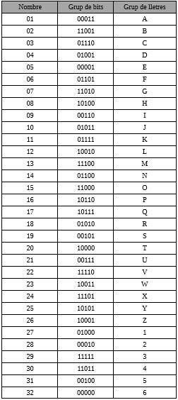 Taula amb 5 bits asosiats a cada caràcter anglés